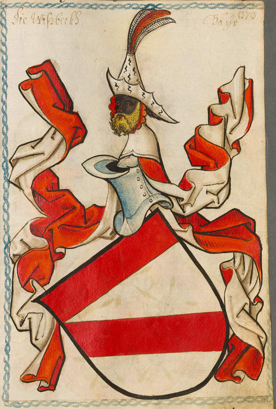 Scheibler'sches Wappenbuch , älterer Teil; Seite 373 die Wißbeckh Bayern